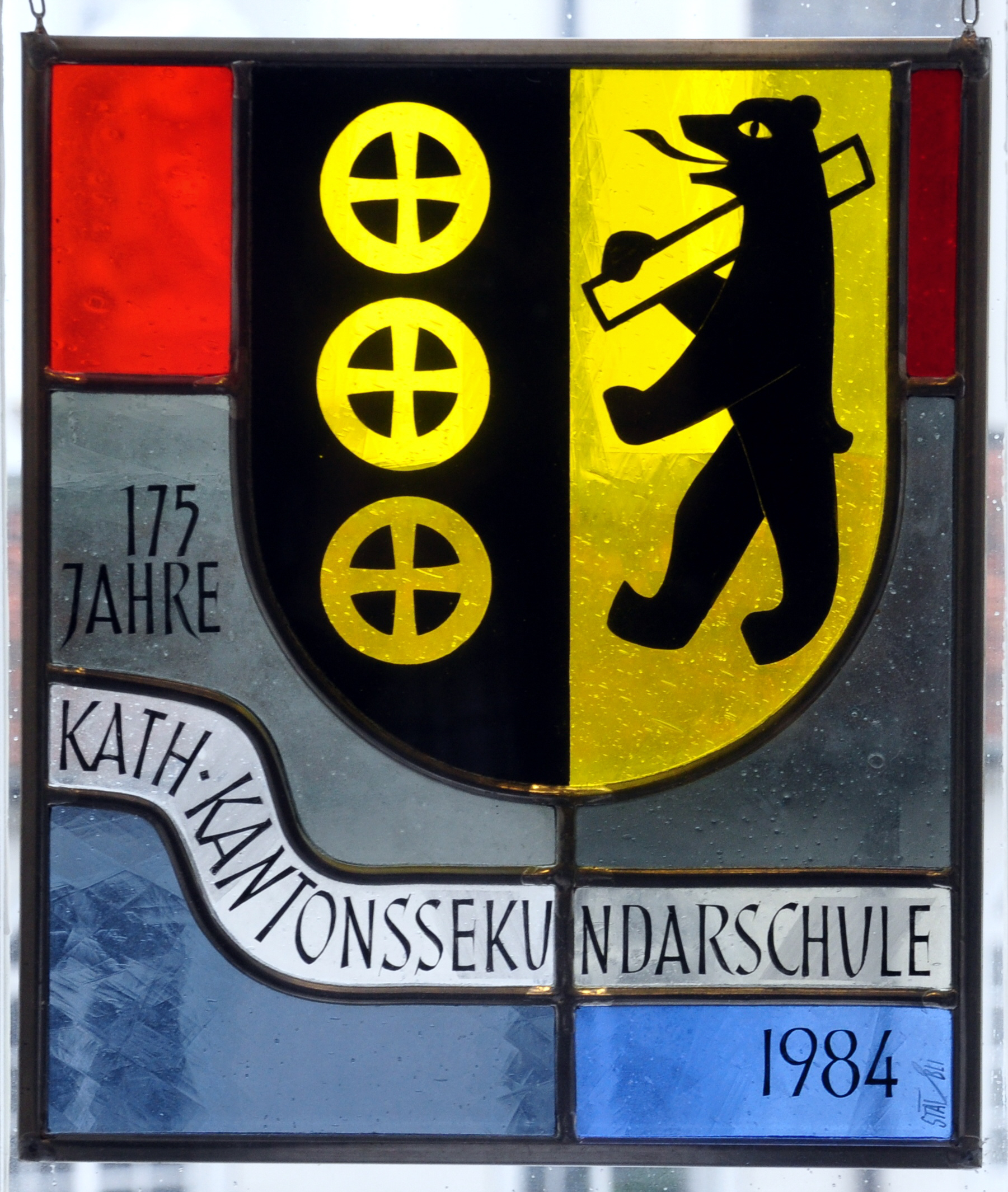 St. Gallen, Stiftsbibliothek, Wappenscheibe im Treppenhaus: Kath. Kantonssekundarschule 1984